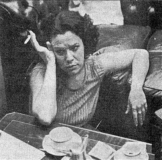 Foto de Elis Regina durante una entrevista con Klaudio Kleiman (Revista Expreso Imaginario). Buenos Aires, diciembre de 1979.